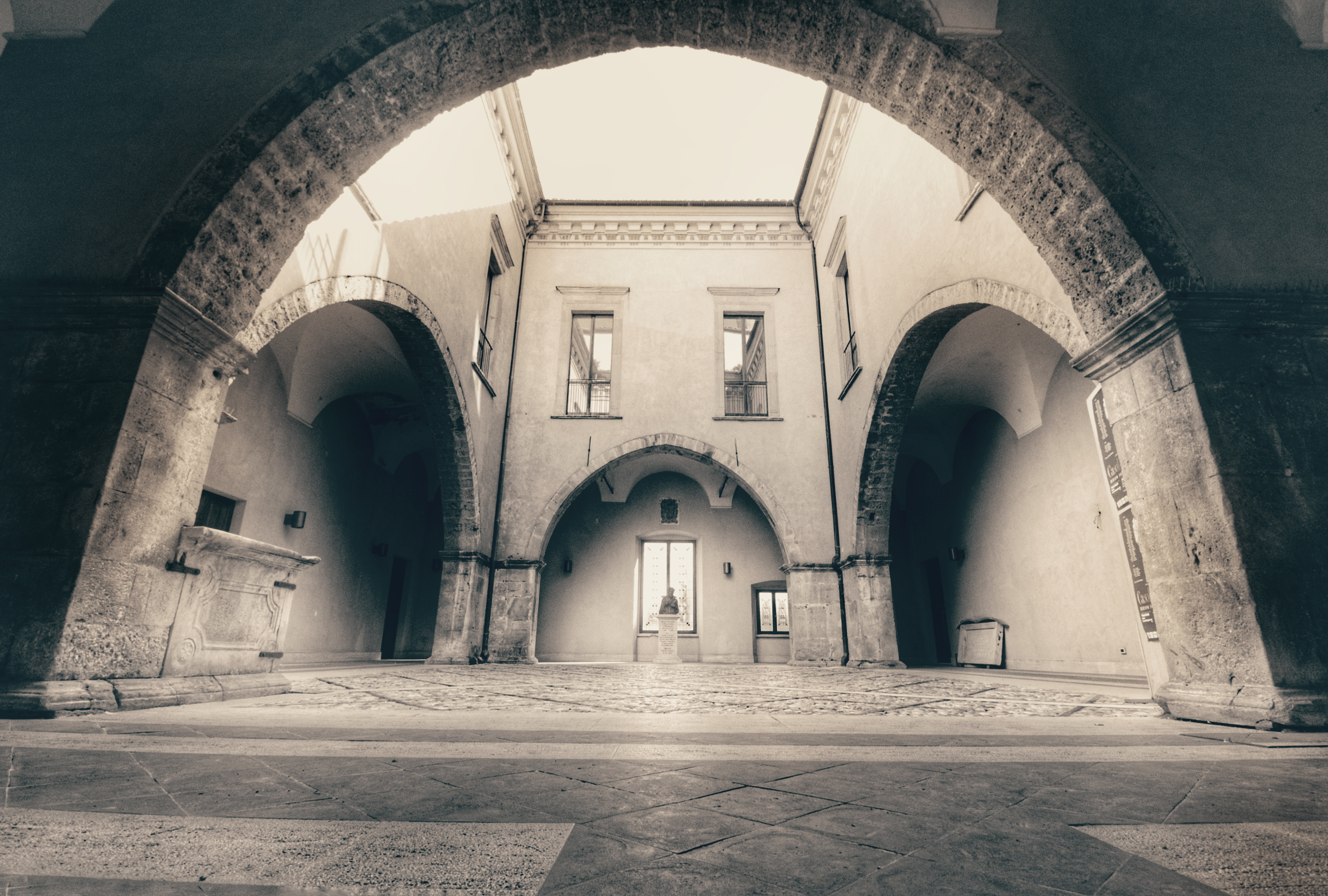 palazzo ducale dei Duchi d'Acquaviva This is a photo of a monument which is part of cultural heritage of Italy.